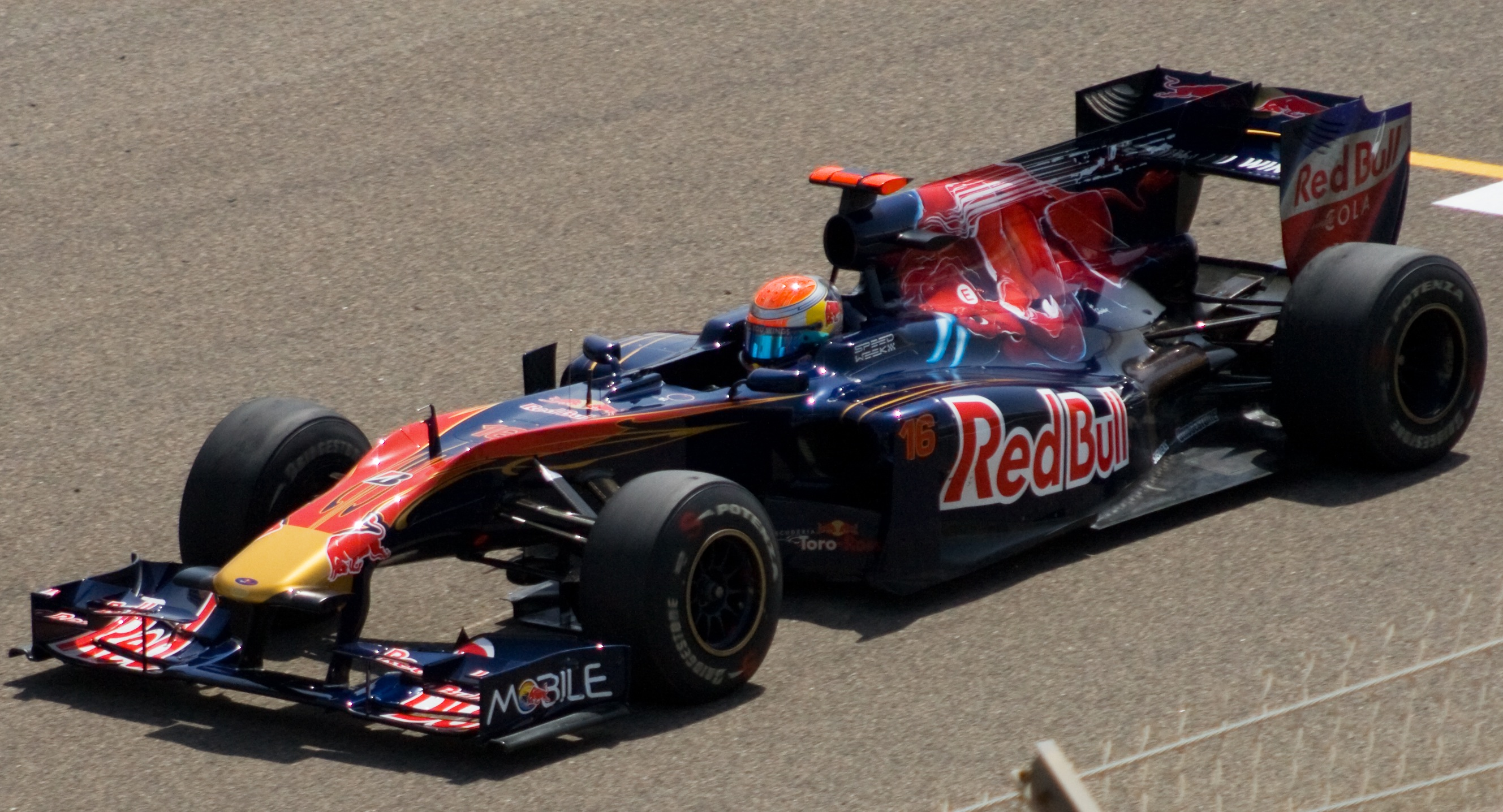 STR5